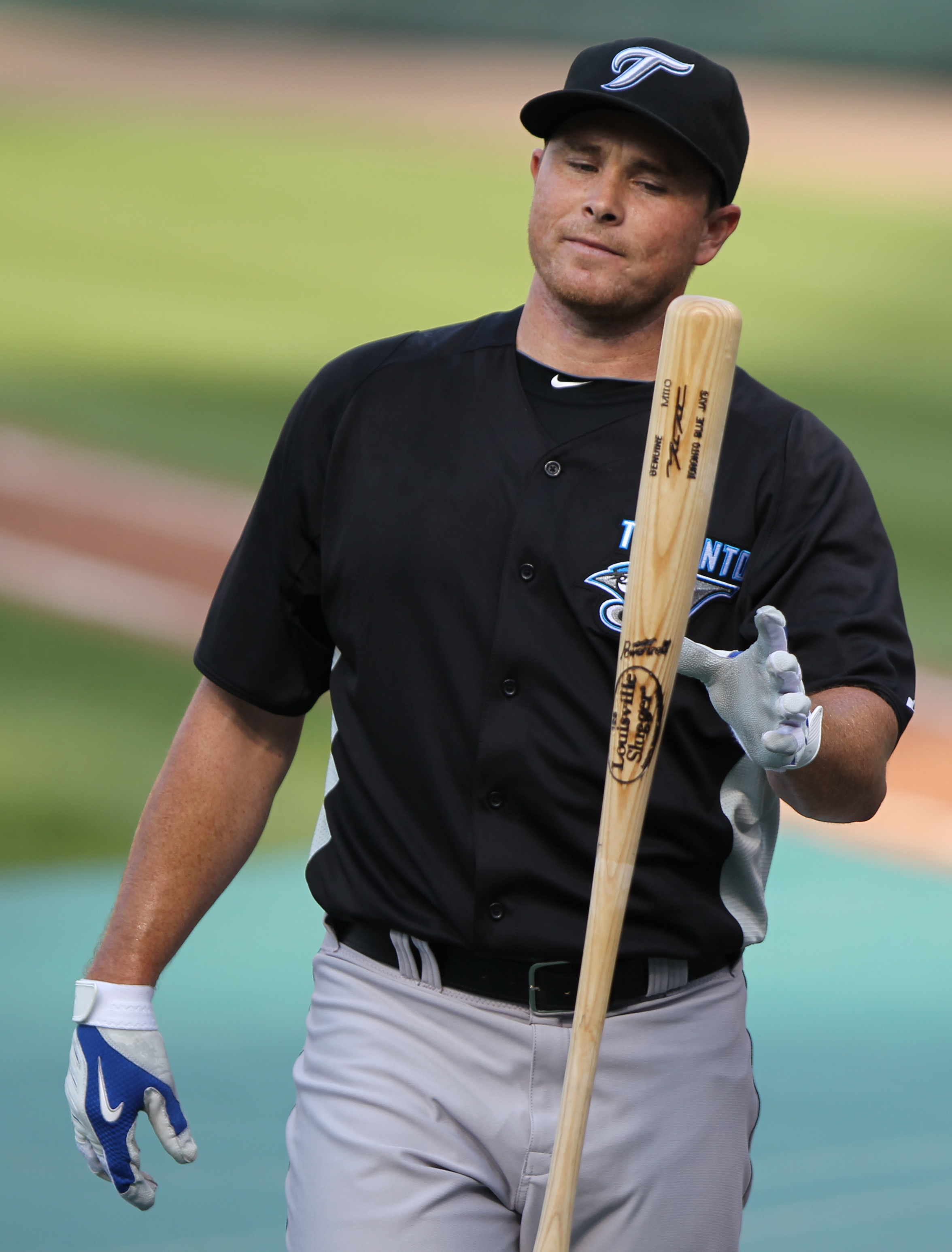 Mark Teahen